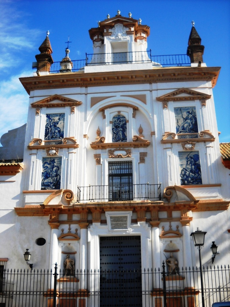 El Hospital de la Caridad fue fundado por Miguel de Mañara en el año 1663. Es la sede de la Hermandad de dicho nombre (no procesiona), fundada también por Mañara